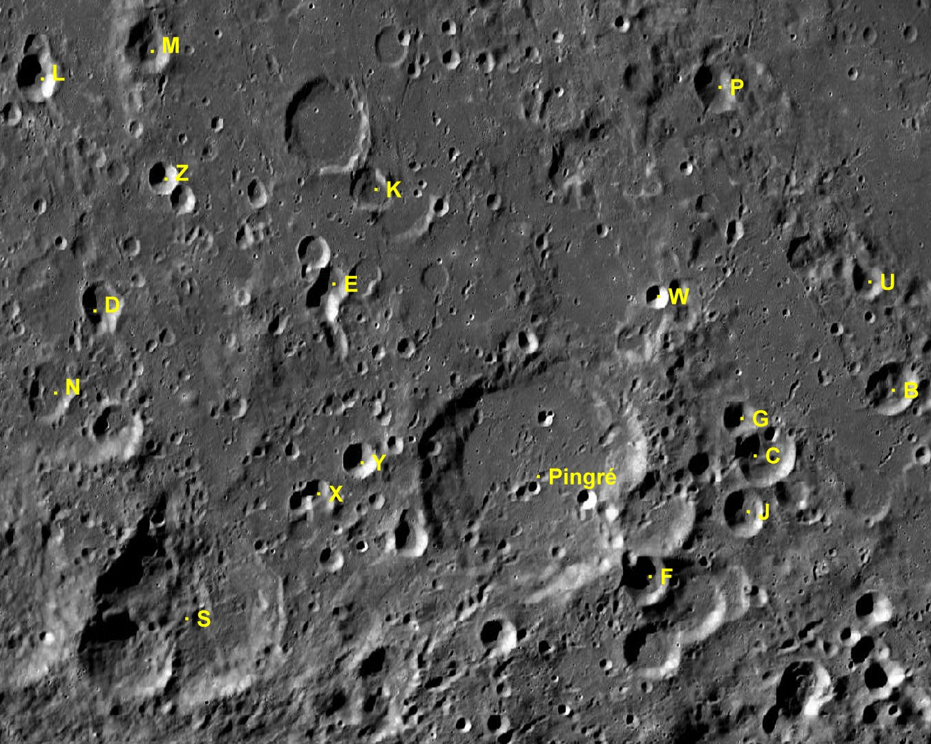 Cráter lunar Pingré. Cráteres satélite. (Imagen LRO)